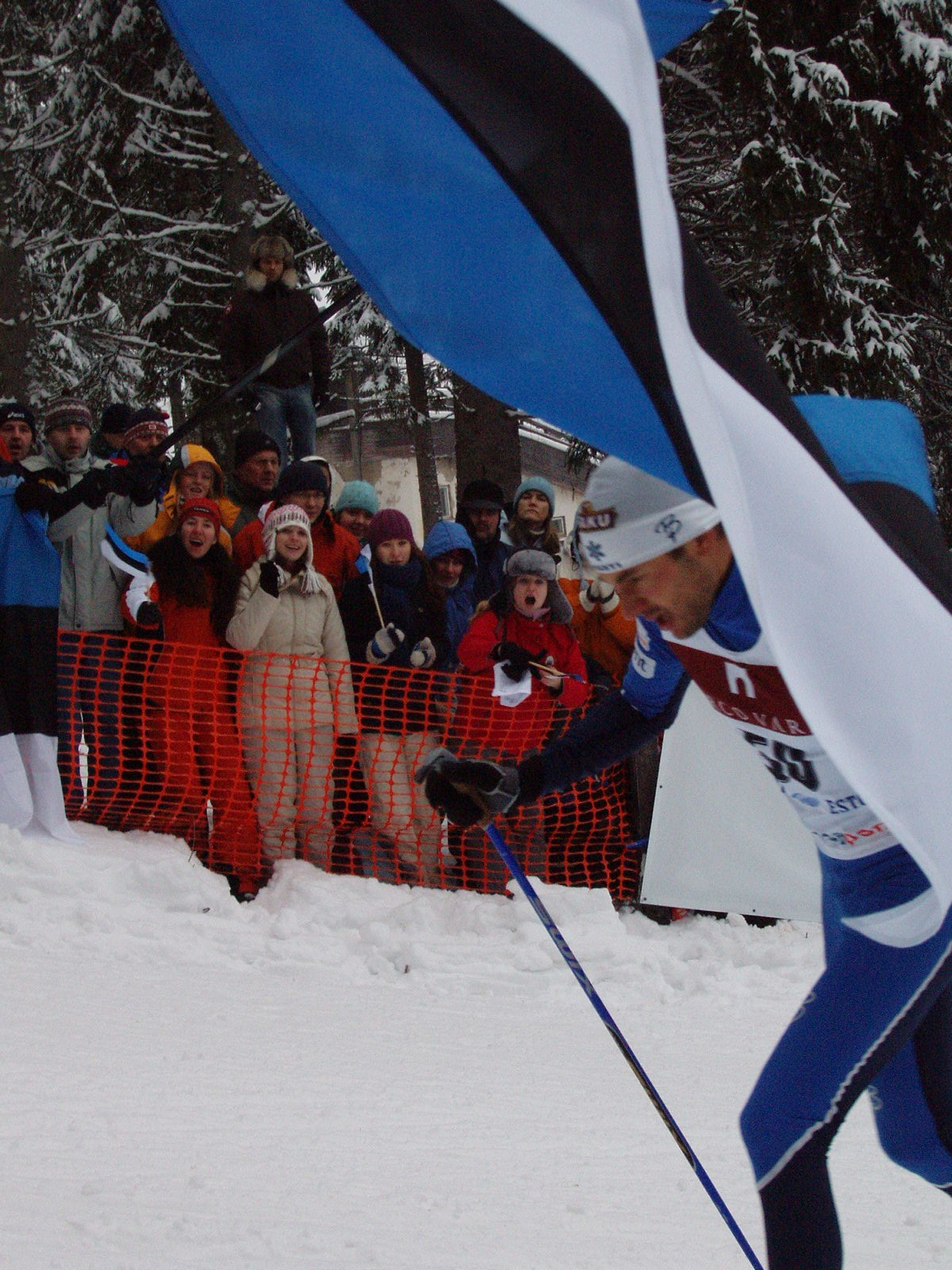 Andrus Veerpalu Otepää MK etapil 2006. aastal